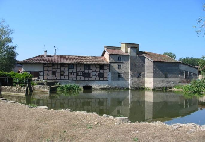 Vue de la facade nord ( arrière du moulin ).